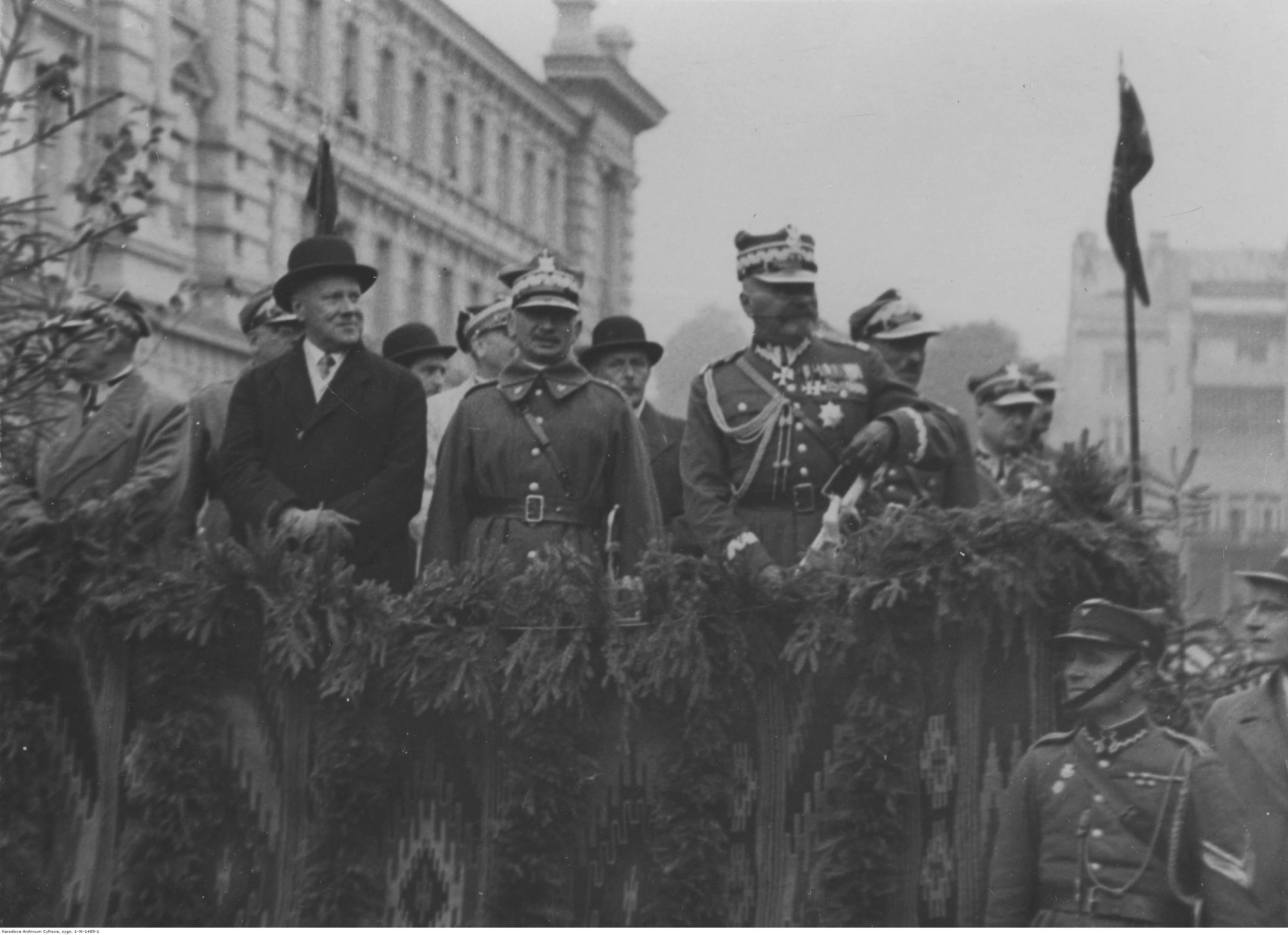 XX - lecie 1 Pułku Artylerii Lekkiej w Wilnie. Na trybunie przyjmujący defiladę na placu Łukiskim w Wilnie. Stoją od lewej: gen. Bolesław Popowicz, wojewoda Władysław Jaszczołt, gen. Juliusz Rómmel, inspektor armii gen. dyw. Daniel Konarzewski. Koncern Ilustrowany Kurier Codzienny - Archiwum Ilustracji. Sygnatura: 1-W-1485-1